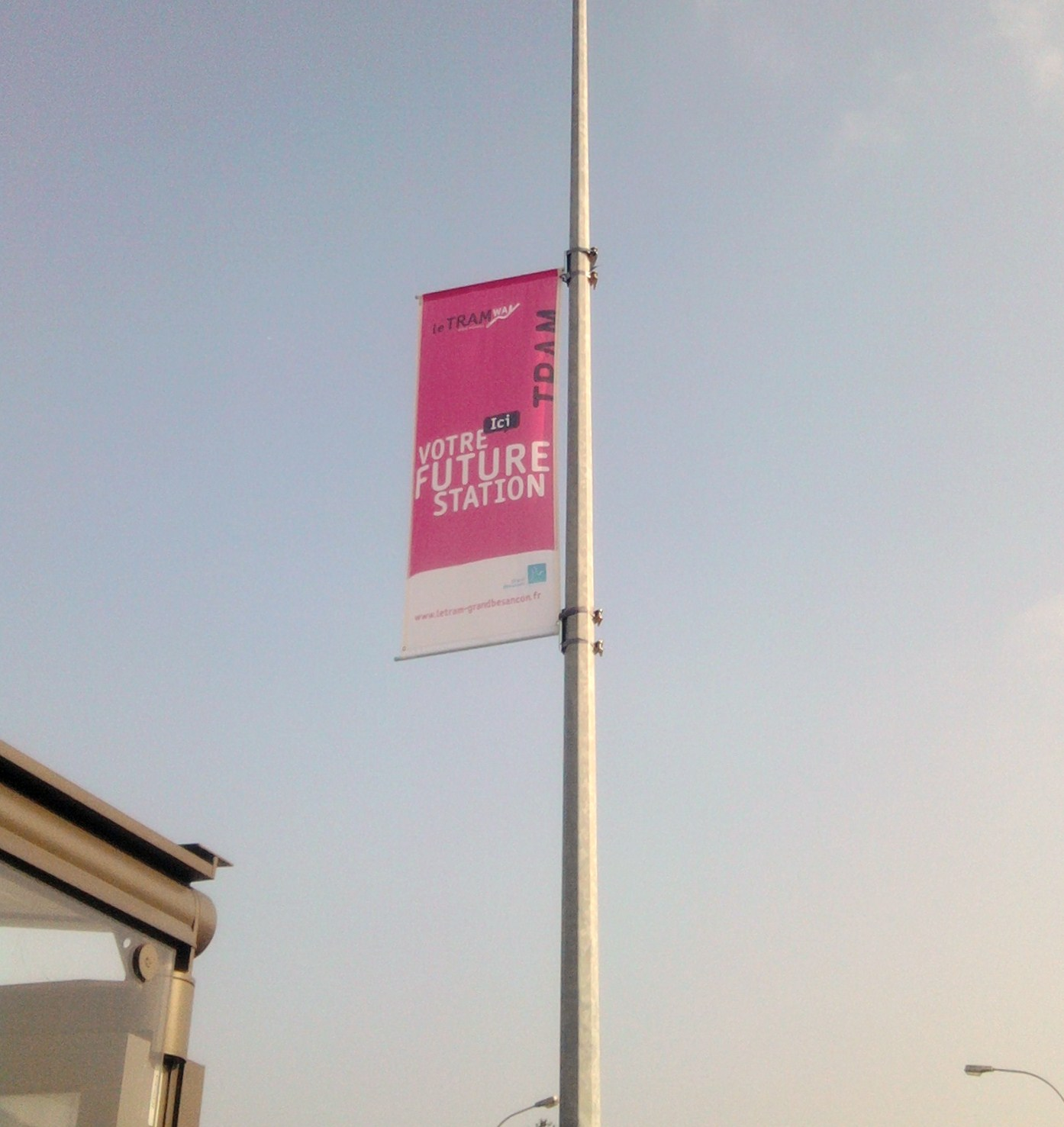 Drapeau signalant une station du tramway de Besançon (Doubs, France).